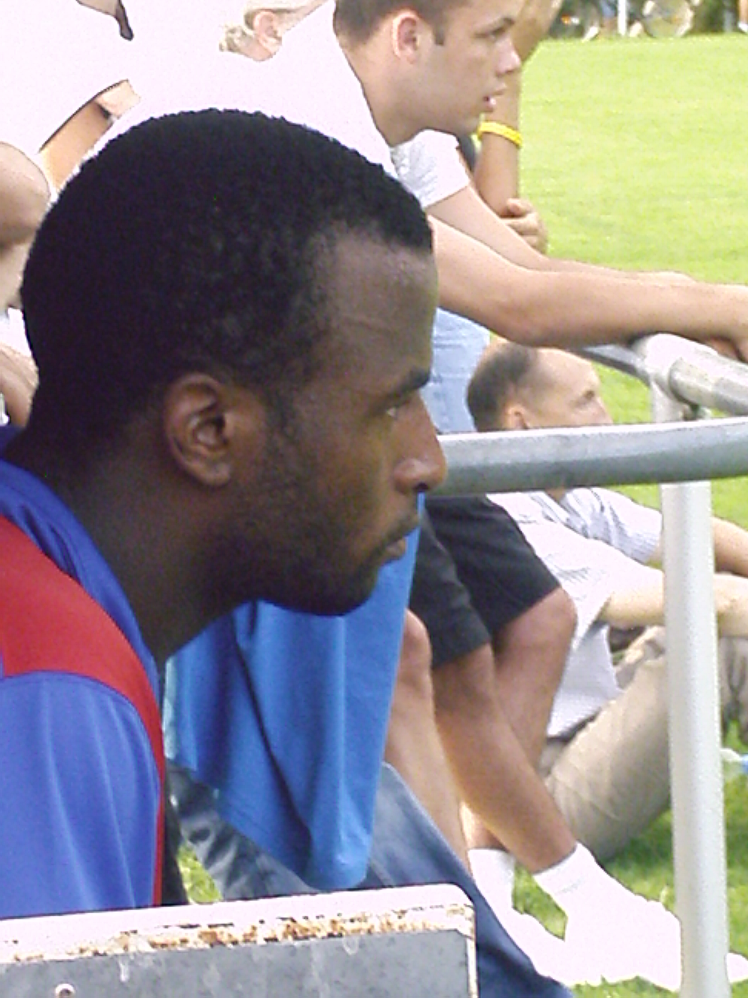 Stéphane Zubar